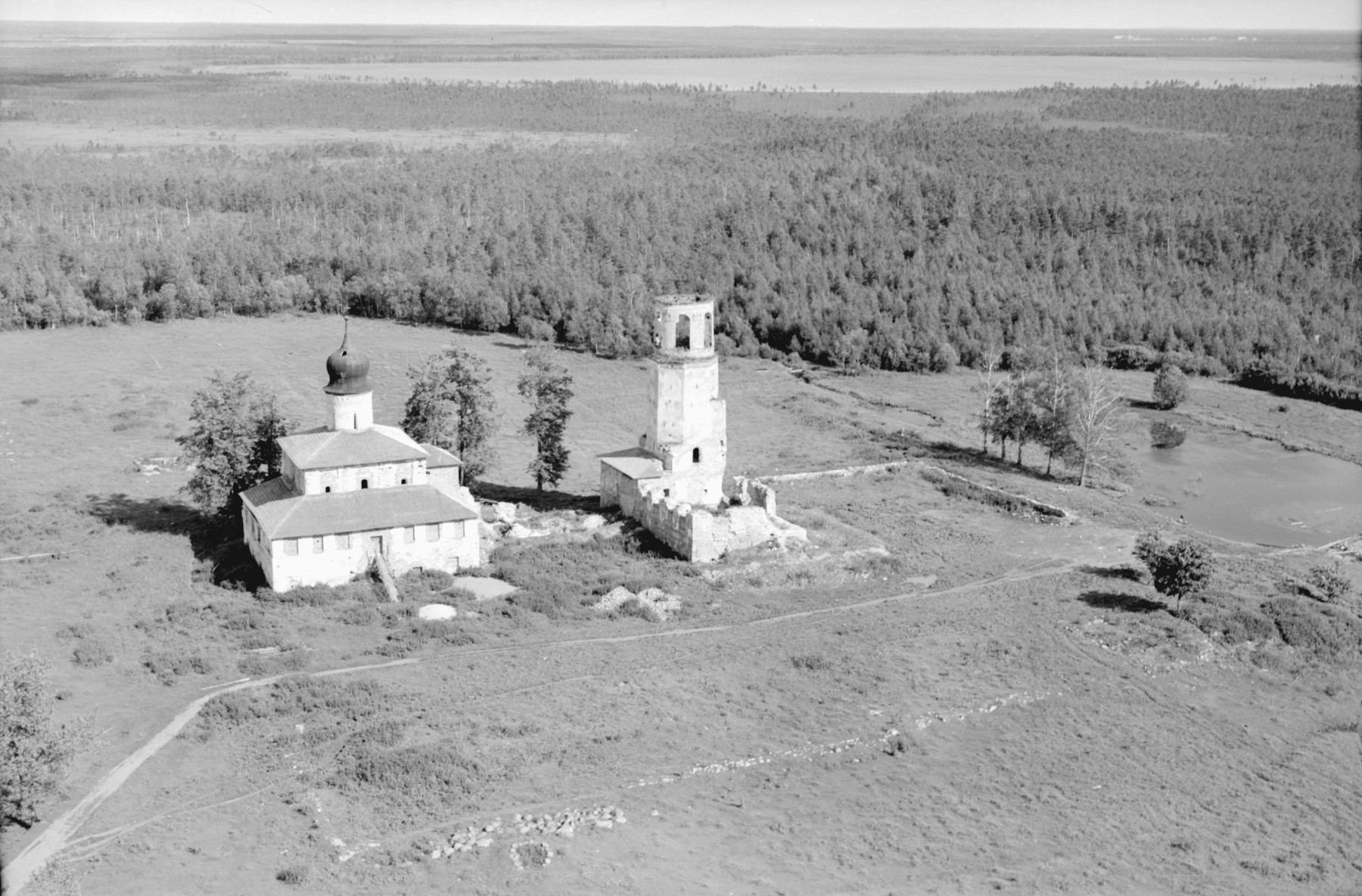 Крыпецкий монастырь с высоты птичьего полета в 1963 году.